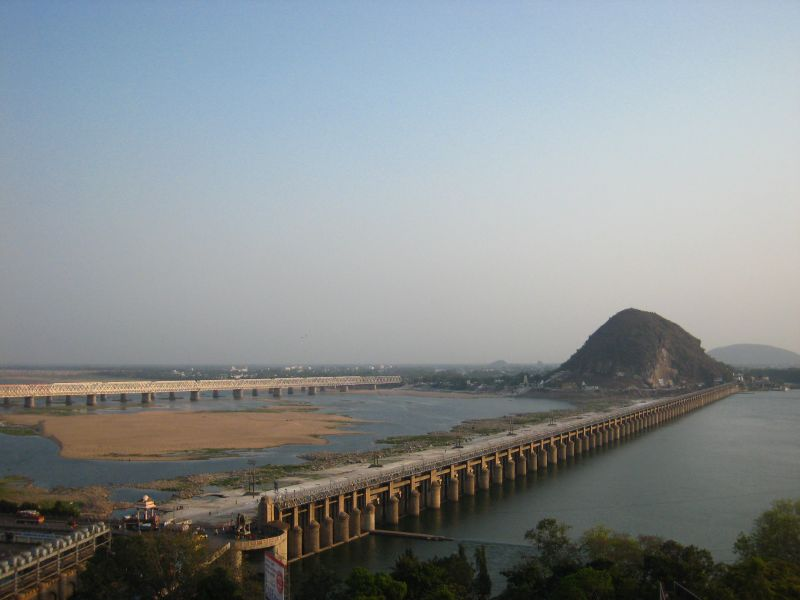 Prakasam Barrage at Vijayawada on Krishna River